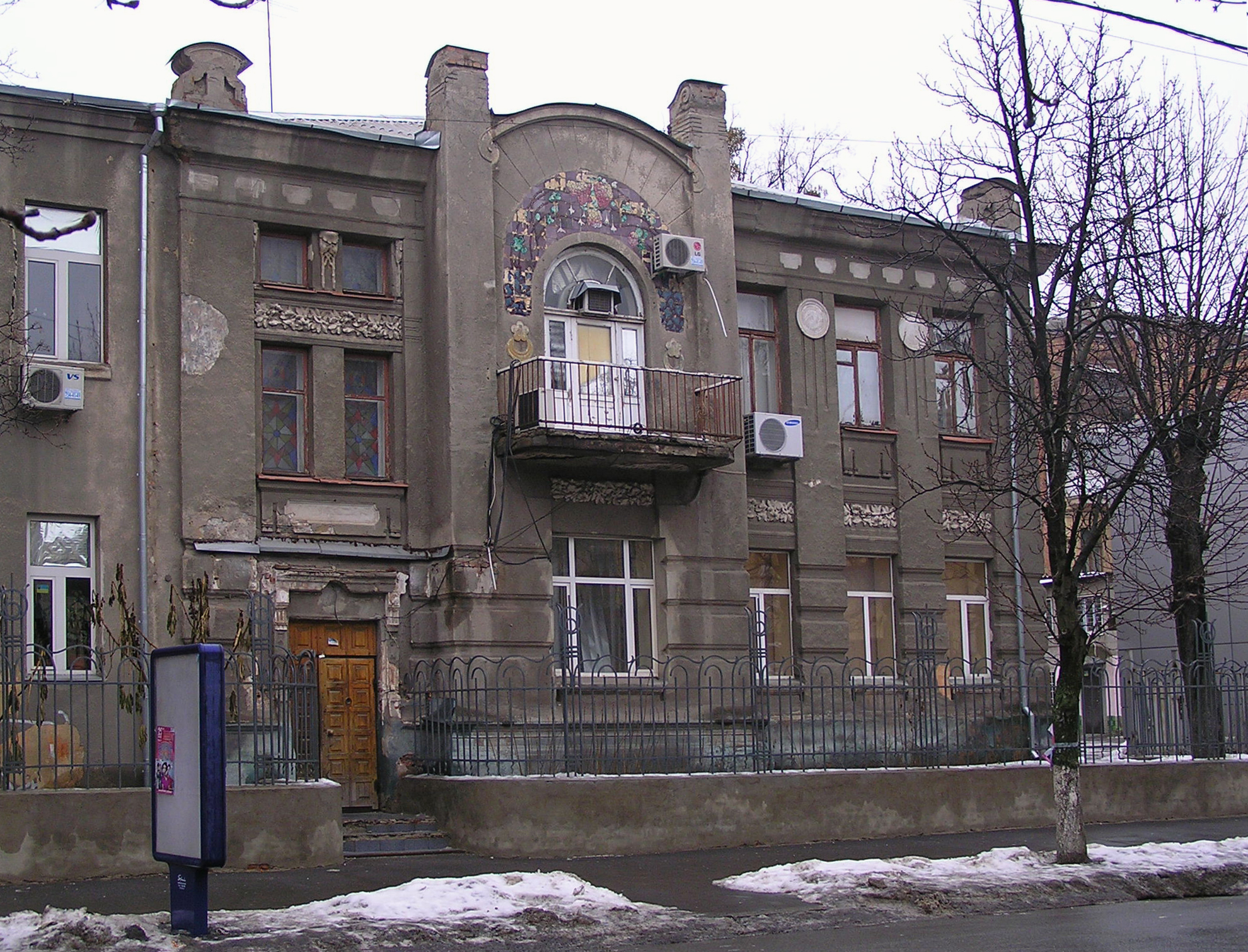 Особняк 1903р., вул.Петровського,3, м.Харків